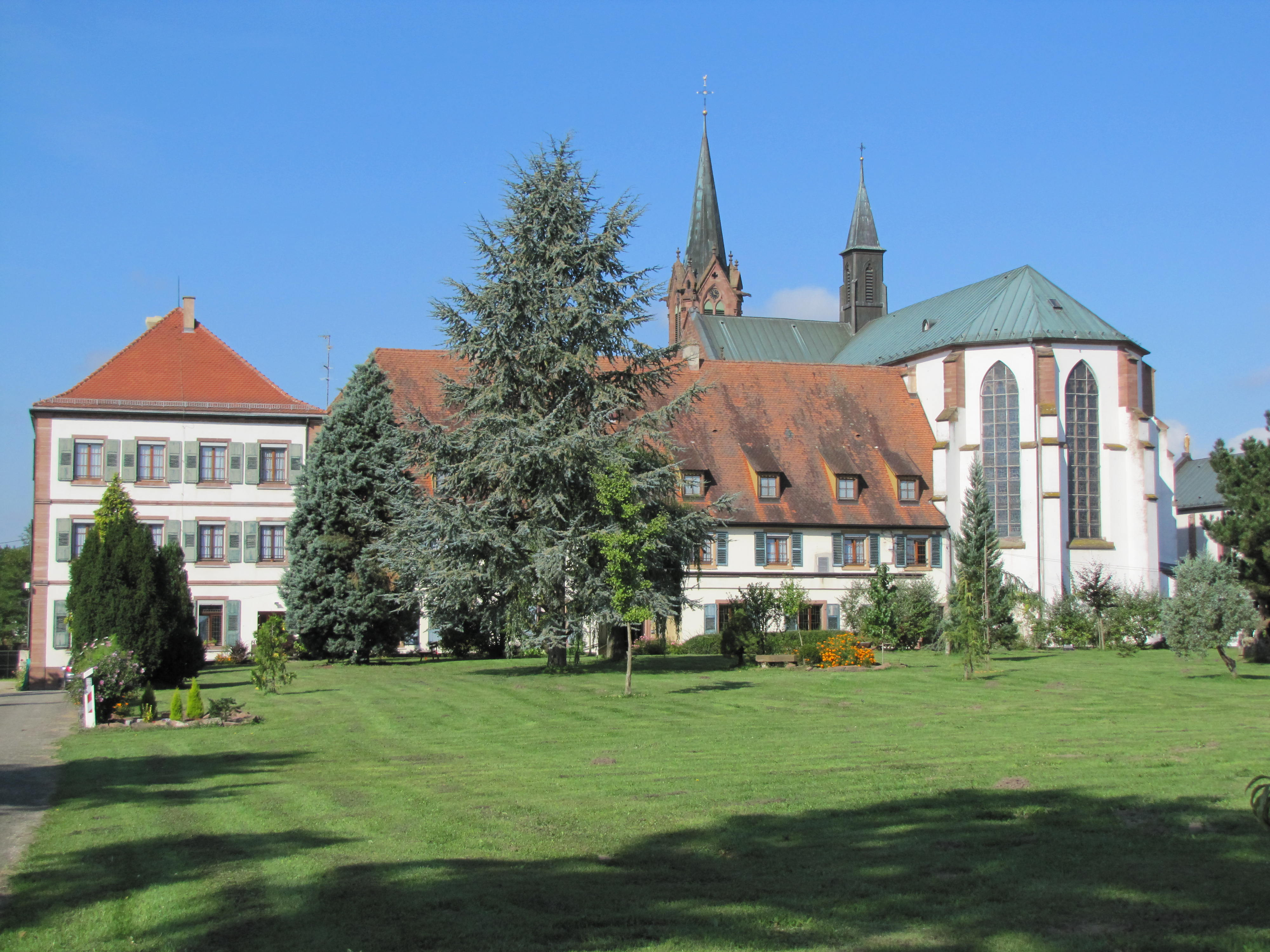 Alsace, Bas-Rhin, Haguenau, Basilique Notre-Dame-des-Douleurs de Marienthal (ancien Prieuré des Guillemites) (IA00062022).